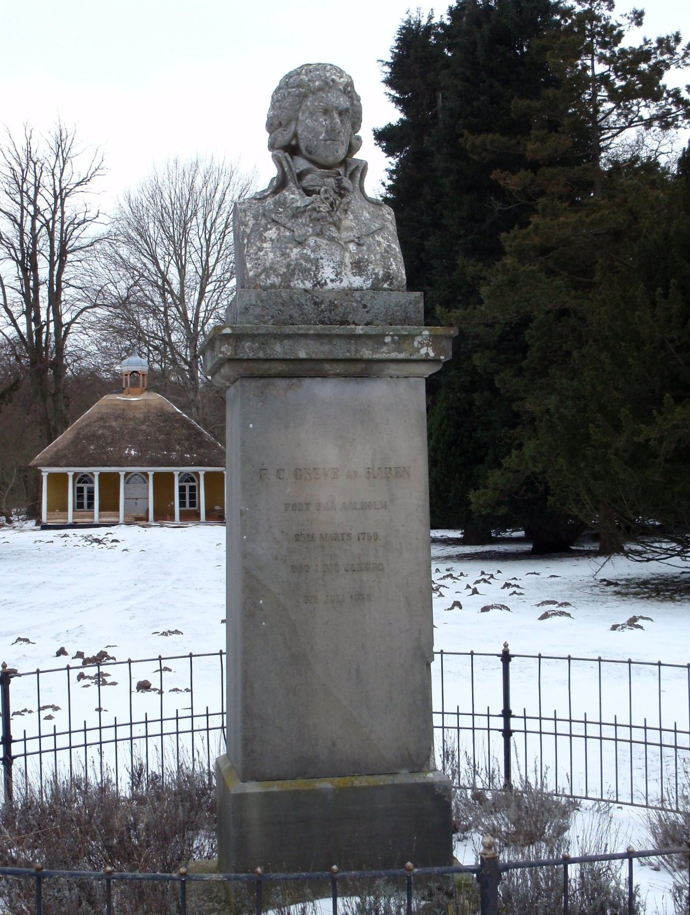 Grev Fredierik Christian Raben (1770-1838) til Christiansholm (Ålholm ved Nysted)